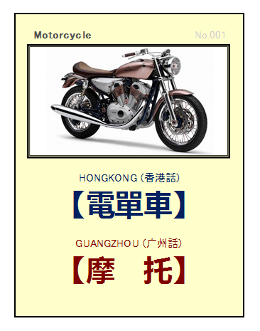 香港語VS広州語のカード